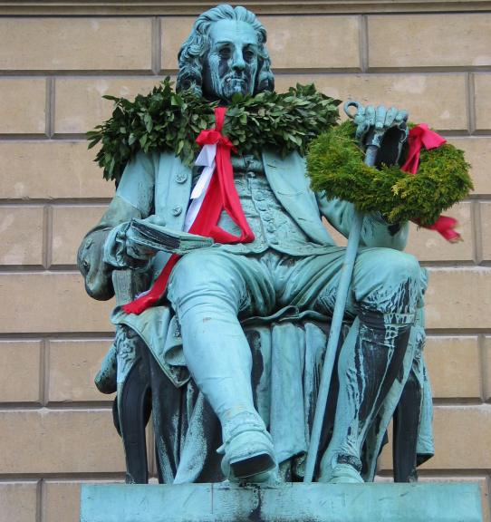 Ludvig Holberg. Statue foran Det Kgl. Teater med fødselsdagskrans. Statuen er udført af Theobald Stein (1829-1901) og blev afsløret i 1875 (forarbejde fra 1850)